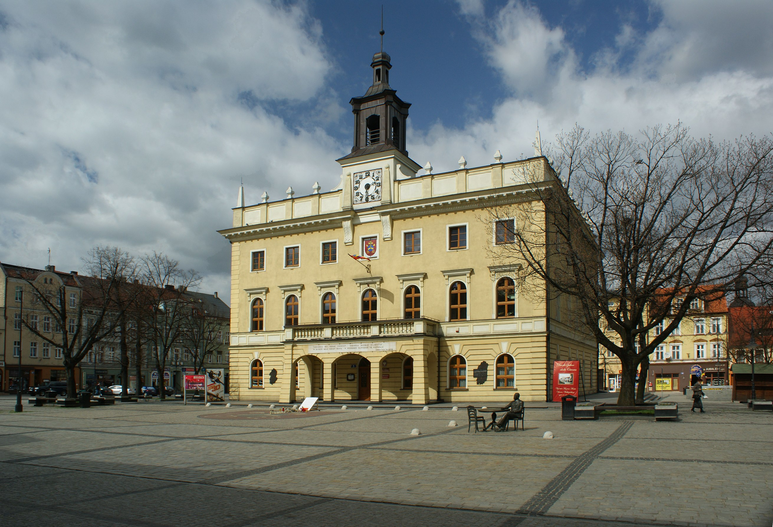 WP/342/Wlkp/A)